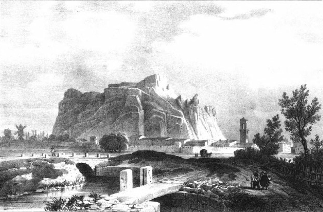 Album du Dauphiné - tome IV, litographie de Pierrelatte, Drome